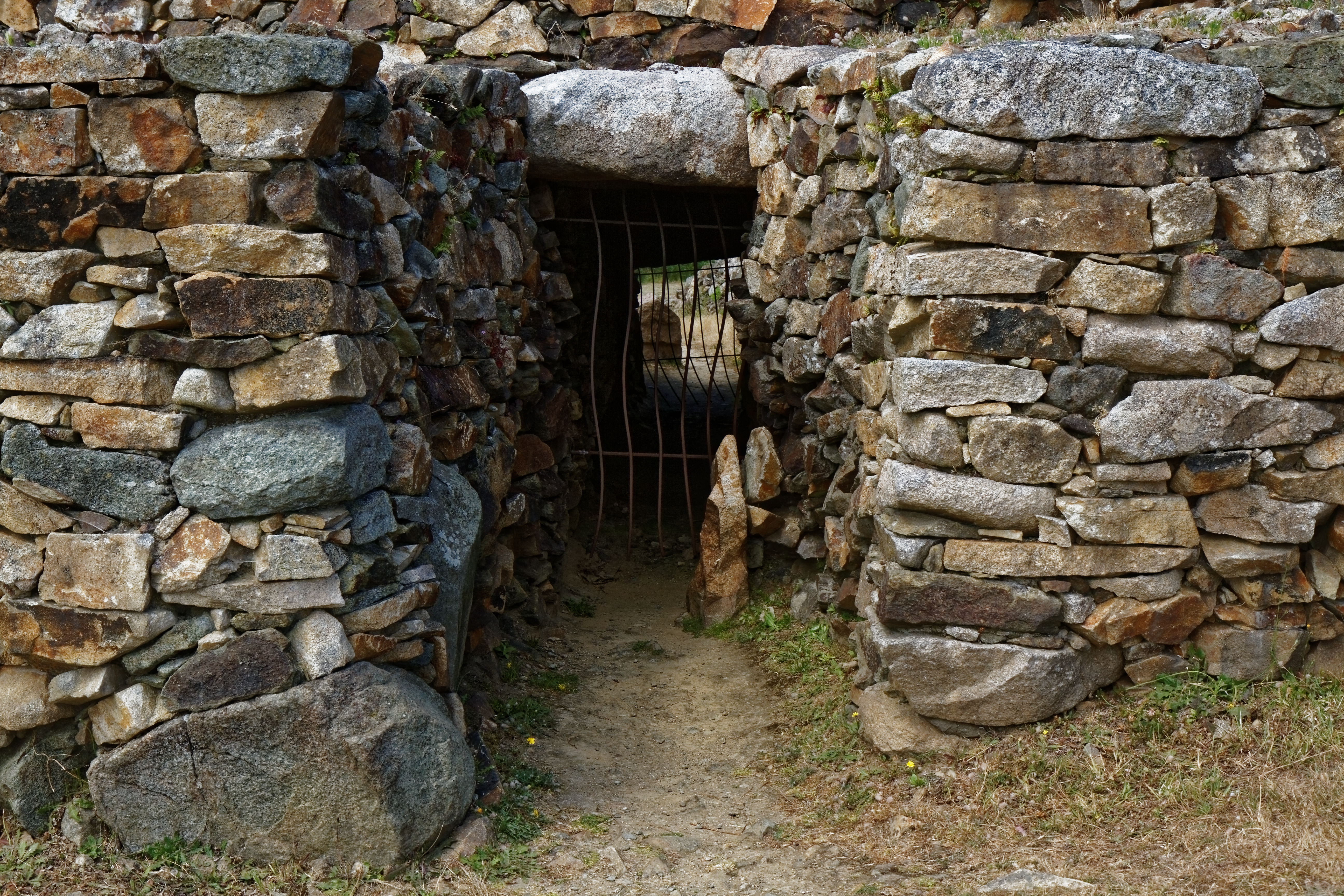 Panorama du Cairn de Barnenez à Plouezoc'h dans le Finistère. .